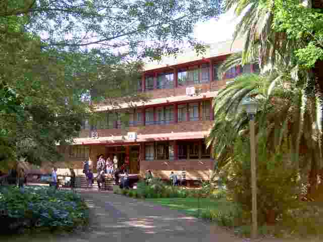 Foto van het gebouw waarin de economische faculteit van de universiteit van potchefstroom is gehuisvest, oktober 2005. Merk op dat er studenten voor de ingang staan (het is 8.15! de colleges beginnen erg vroeg. Dat zou in Nederland ondenkbaar zijn).